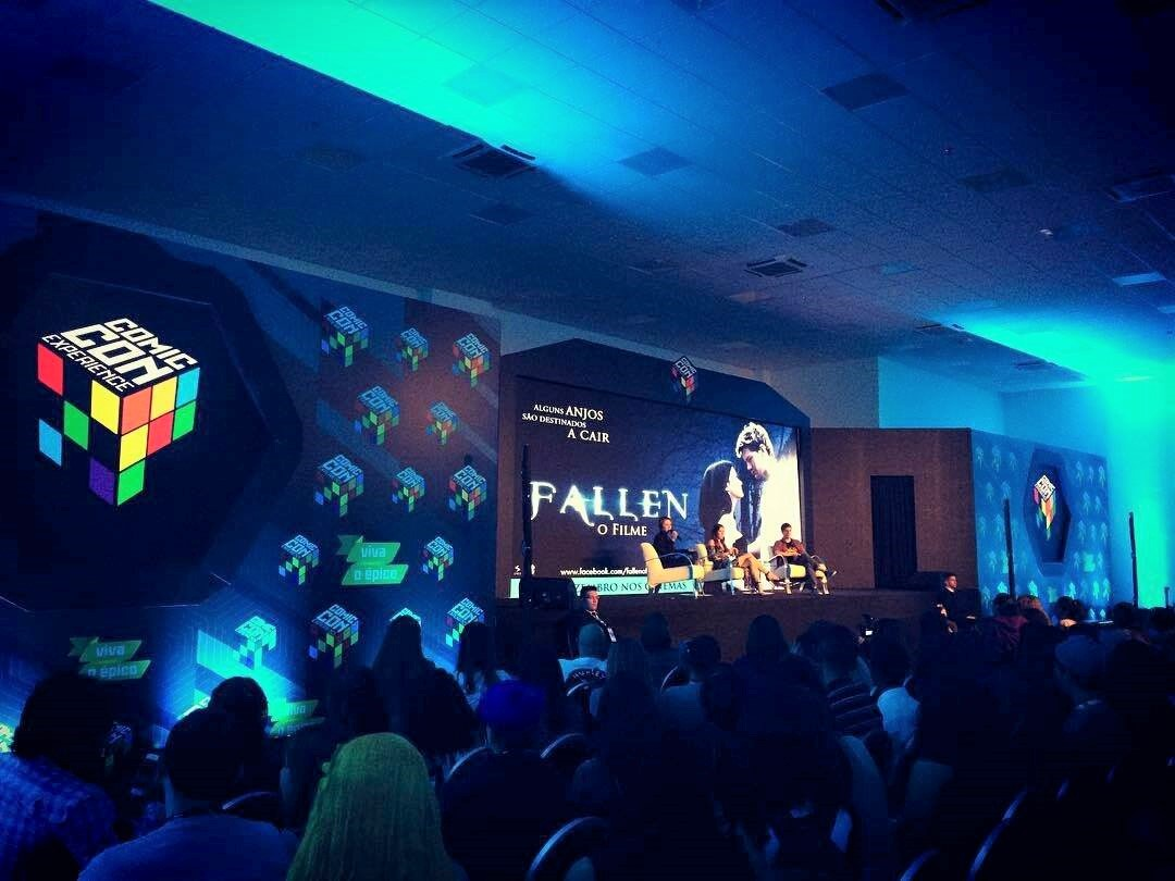 Fallen en promoción en Brasil.